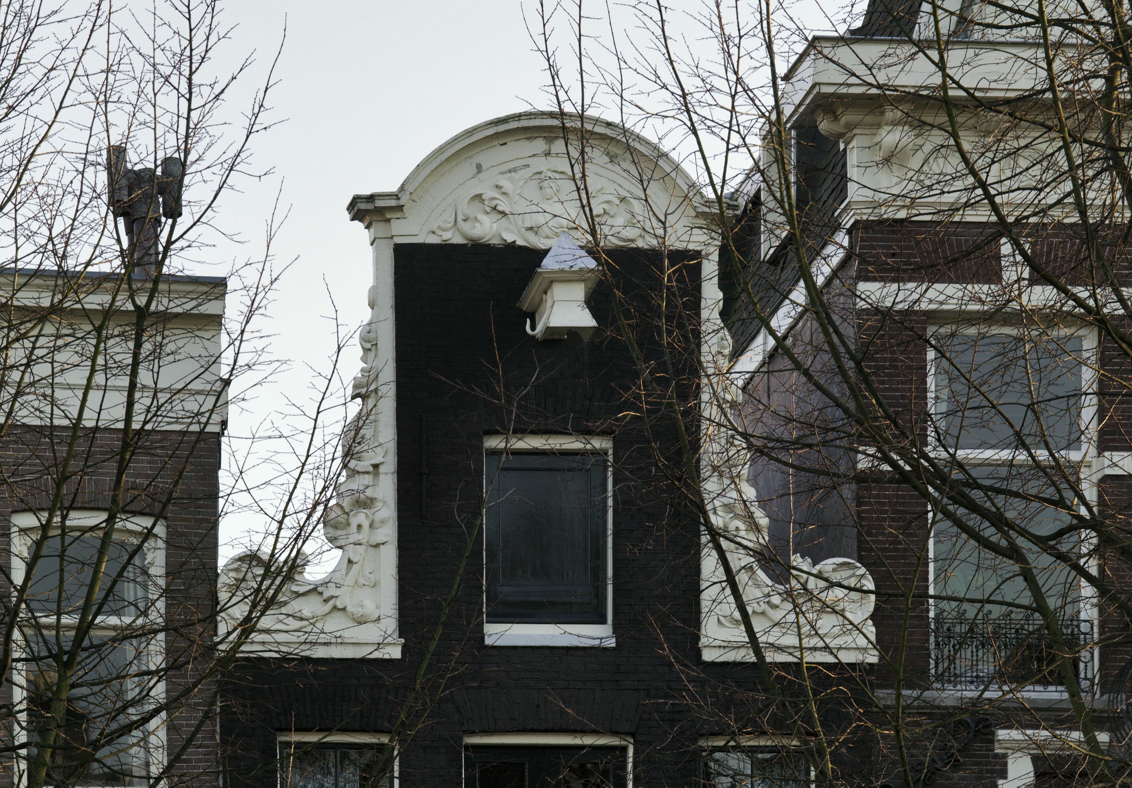 Stucwerk: Overzicht voorgevel, stucwerk, doorboorde bloem met buste in reliëf boven hijsbalk van Anthonie Turck (opmerking: Gefotografeerd voor: P.M. Fischer, Ignatius en Jan van Logteren, Alphen a/d Rijn 2005.)